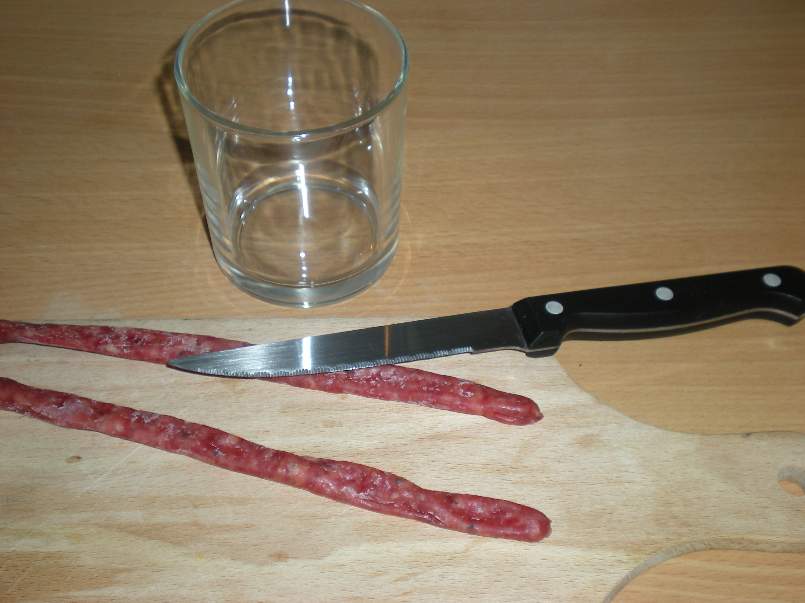 Fuet catalan.